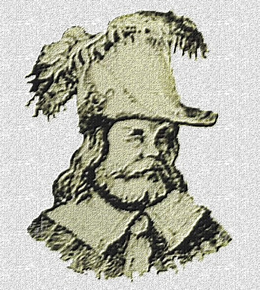 Książę pomorski Warcisław III